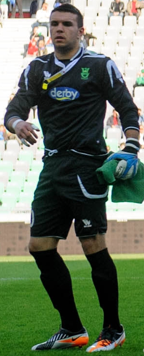 31 March 2012, Stozsice, Ljubljana, Slovenia - Olimpija during football game Olimpija - Domzale, round 27 of PrvaLiga 2011-2012.